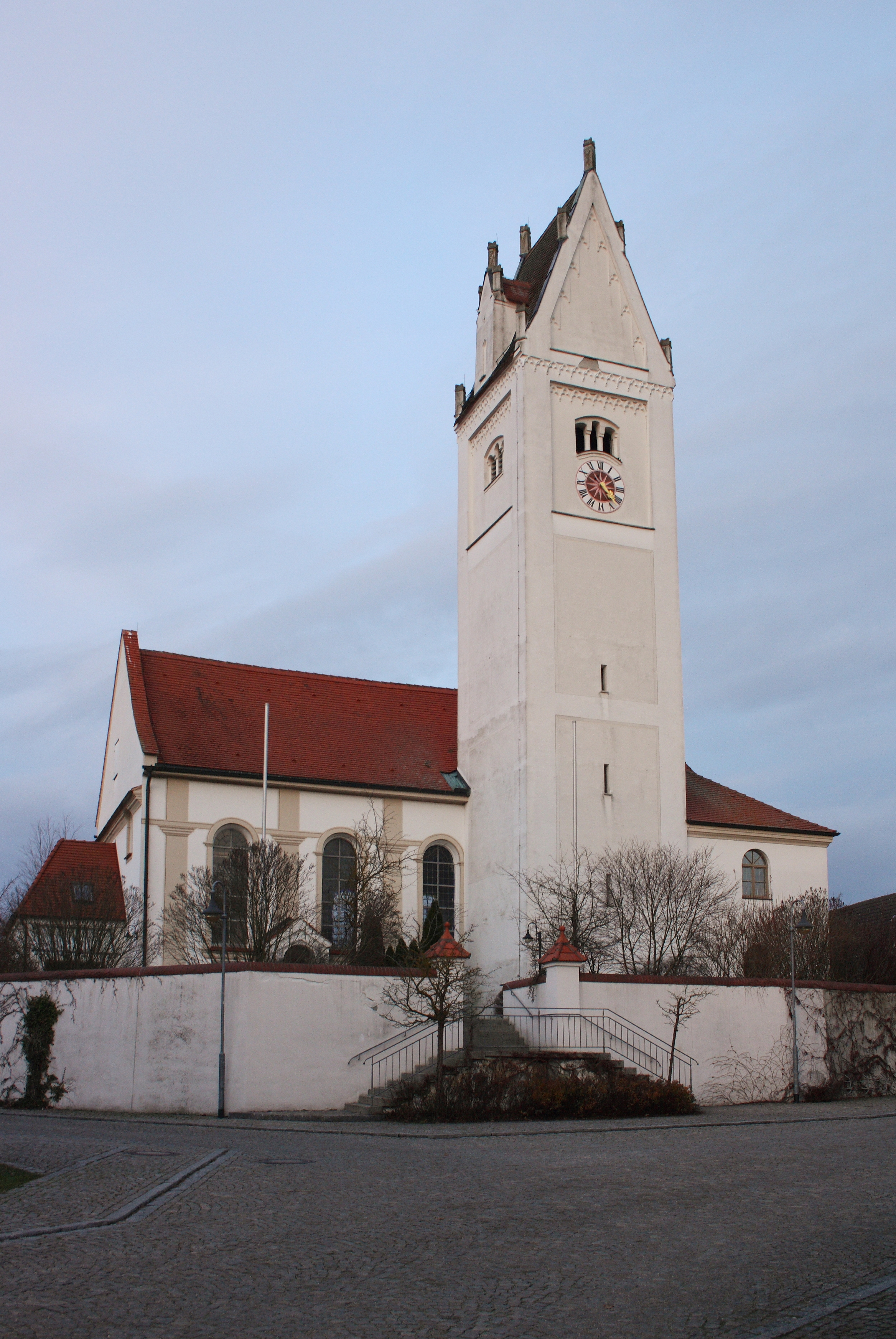 Martin in Langenhaslach, einem Ortsteil von Neuburg an der Kammel im Landkreis Günzburg (Bayern), Neubau von 1737, spätgotischer Turm aus der zweiten Hälfte des 15. Jahrhunderts, mit Satteldach, Dreipassfriesen und Fialen